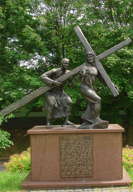 Częstochowa, zespół klasztorny paulinów na Jasnej Górze